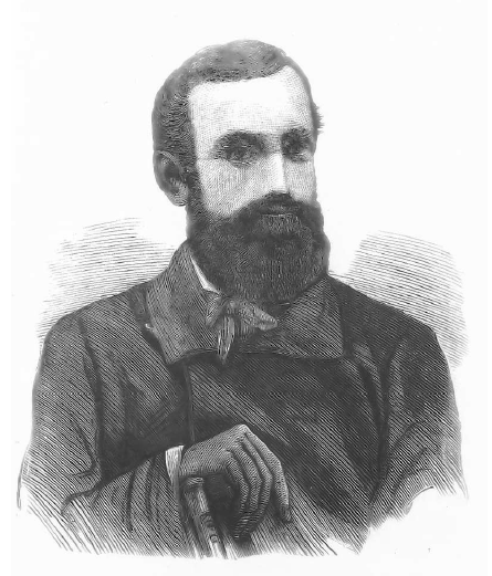 Edmund Bojanowski (1814–1871). Rys. wg czasopisma „Sobótka” 1871, wykonany na podstawie oryginalnej fotografii.